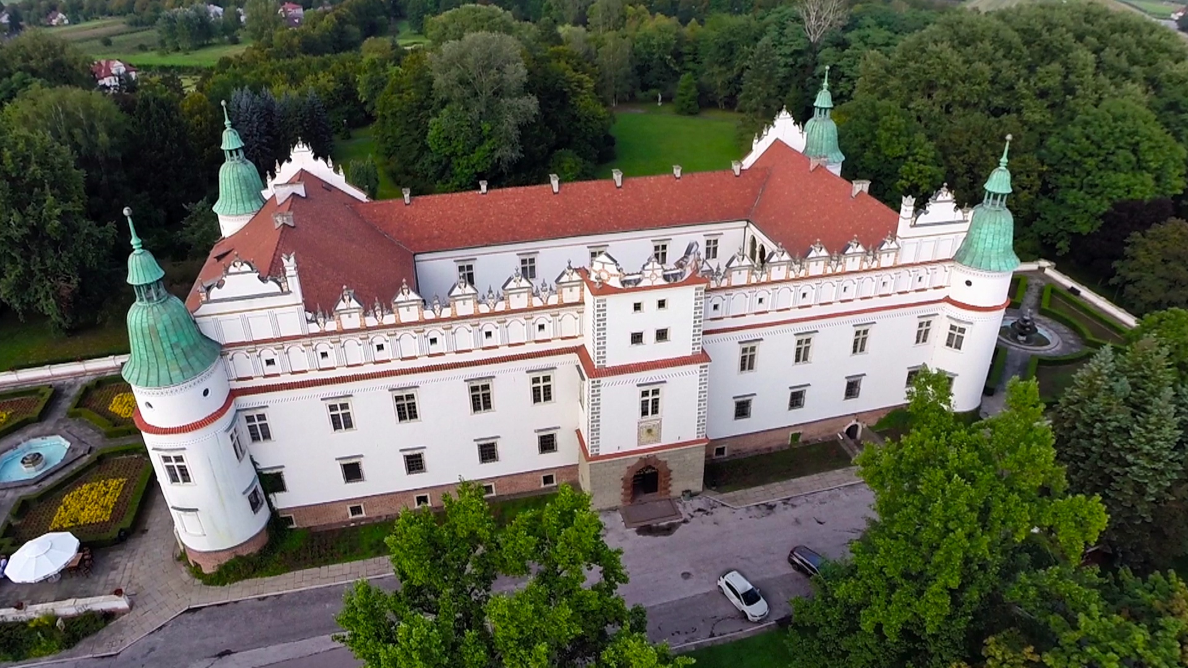 Baranów Sandomierski, zamek, 1591-1606, kon. XVII, XIX